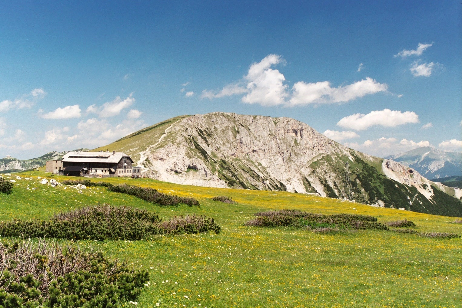 Karl-Ludwig-Haus, dahinter der Predigtstuhl (1.902 m), ganz rechts der Schneeberg (2.076 m), ganz links das Habsburghaus